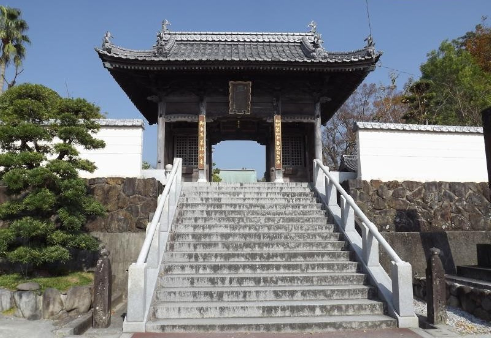 観自在寺の仁王門